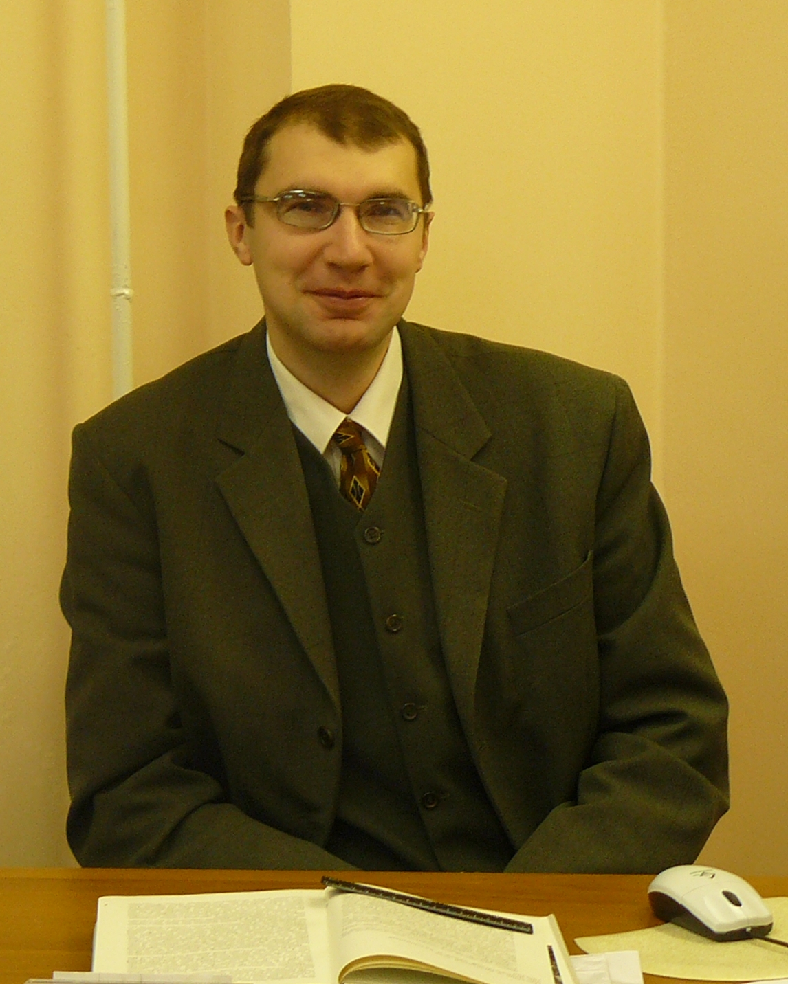 Денис Владимирович Дук